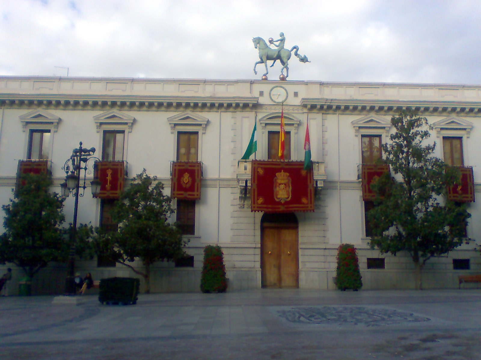 Ayuntamiento de Granada en el día de la Patrona de 2008